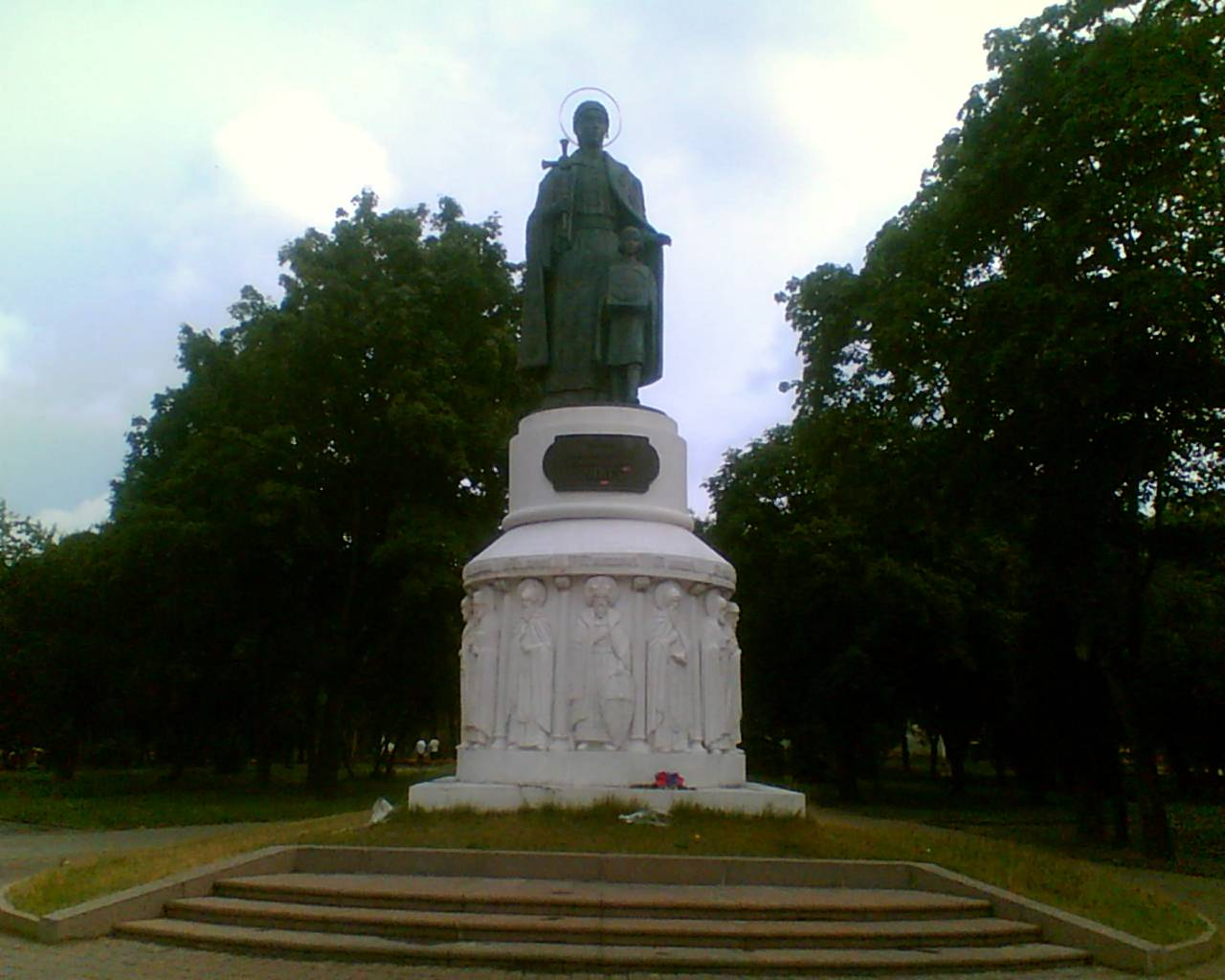 За місцевою легендою, київська княгиня Ольга була родом зі Пскова.